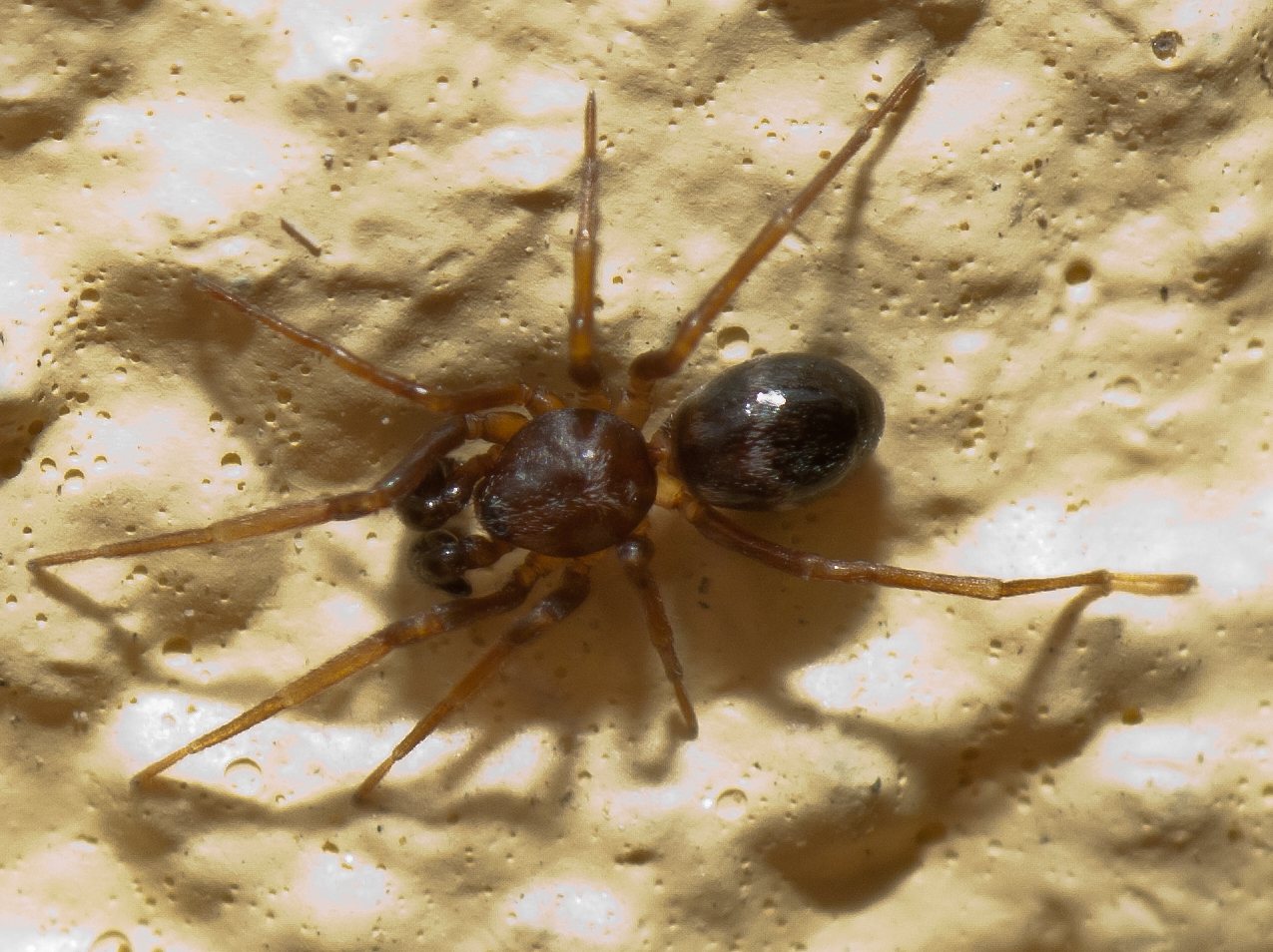 Araña (Phrurolithus sp.) en Valverde, Vilarromarís, Oroso, Galicia (Spain)